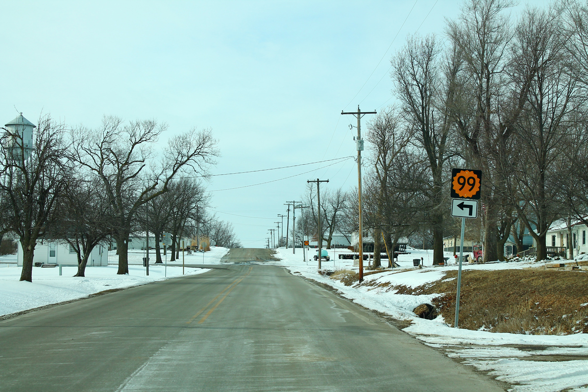 KS99sRoadSignLeft-BeattieKS